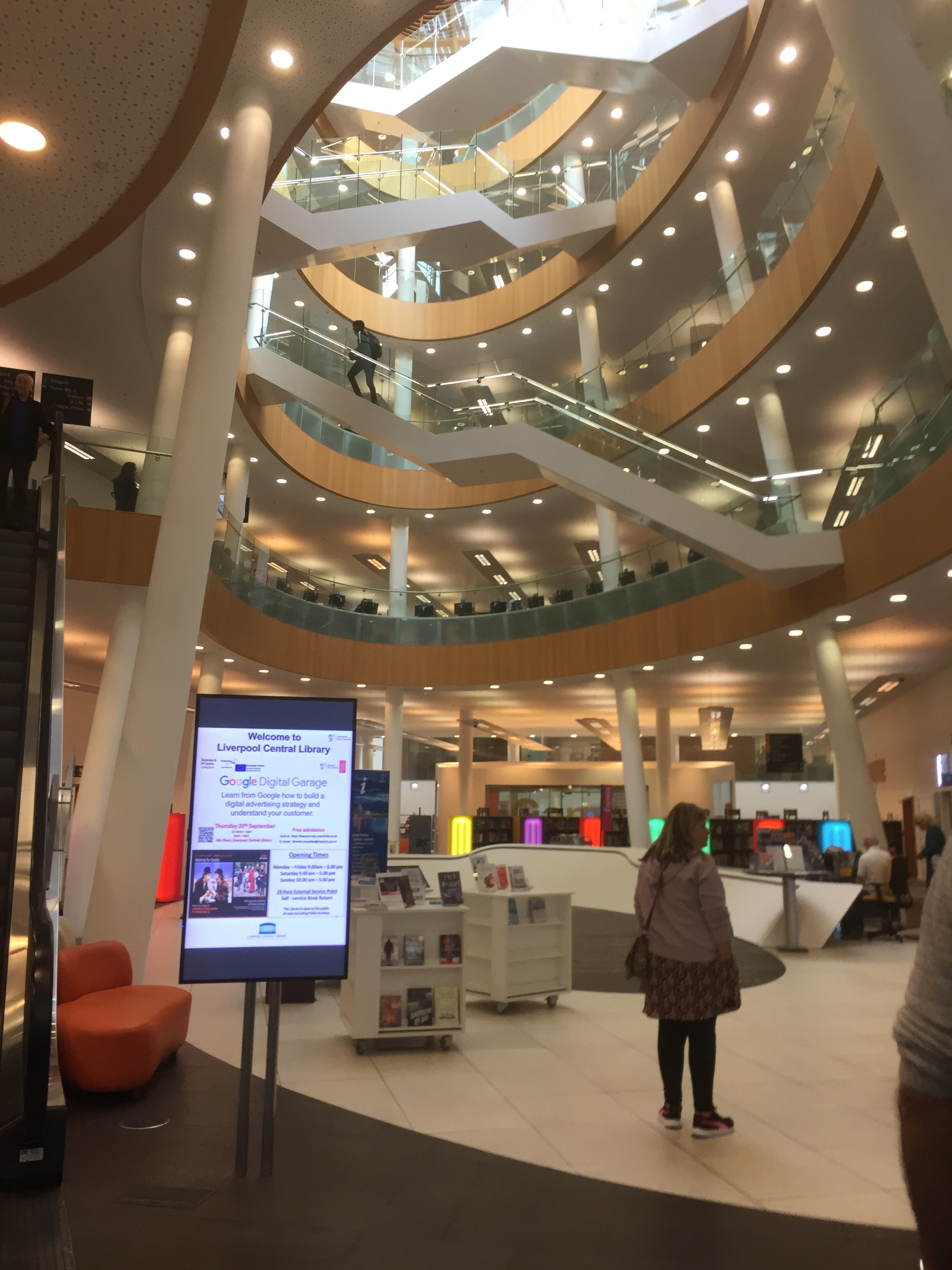 Liverpulio centrinės bibliotekos interjeras